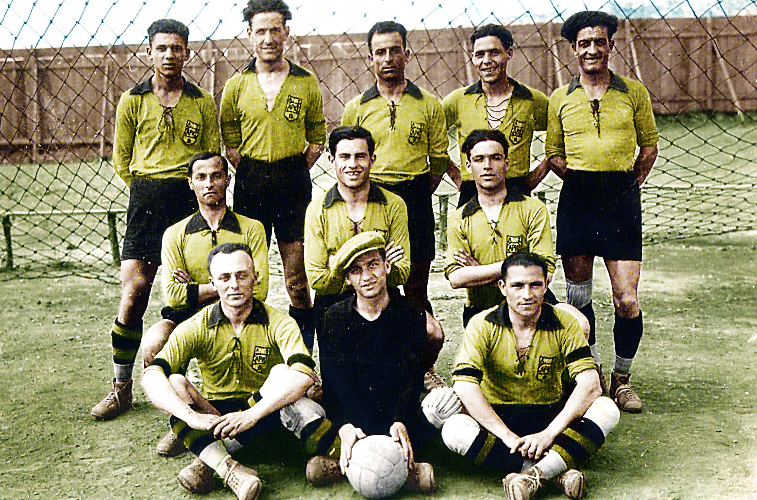 Η ομάδα του Άρη Θεσσαλονίκης πρωταθλήτρια Ελλάδας 1928. Χρωματική επεξεργασία από το user Sportingn